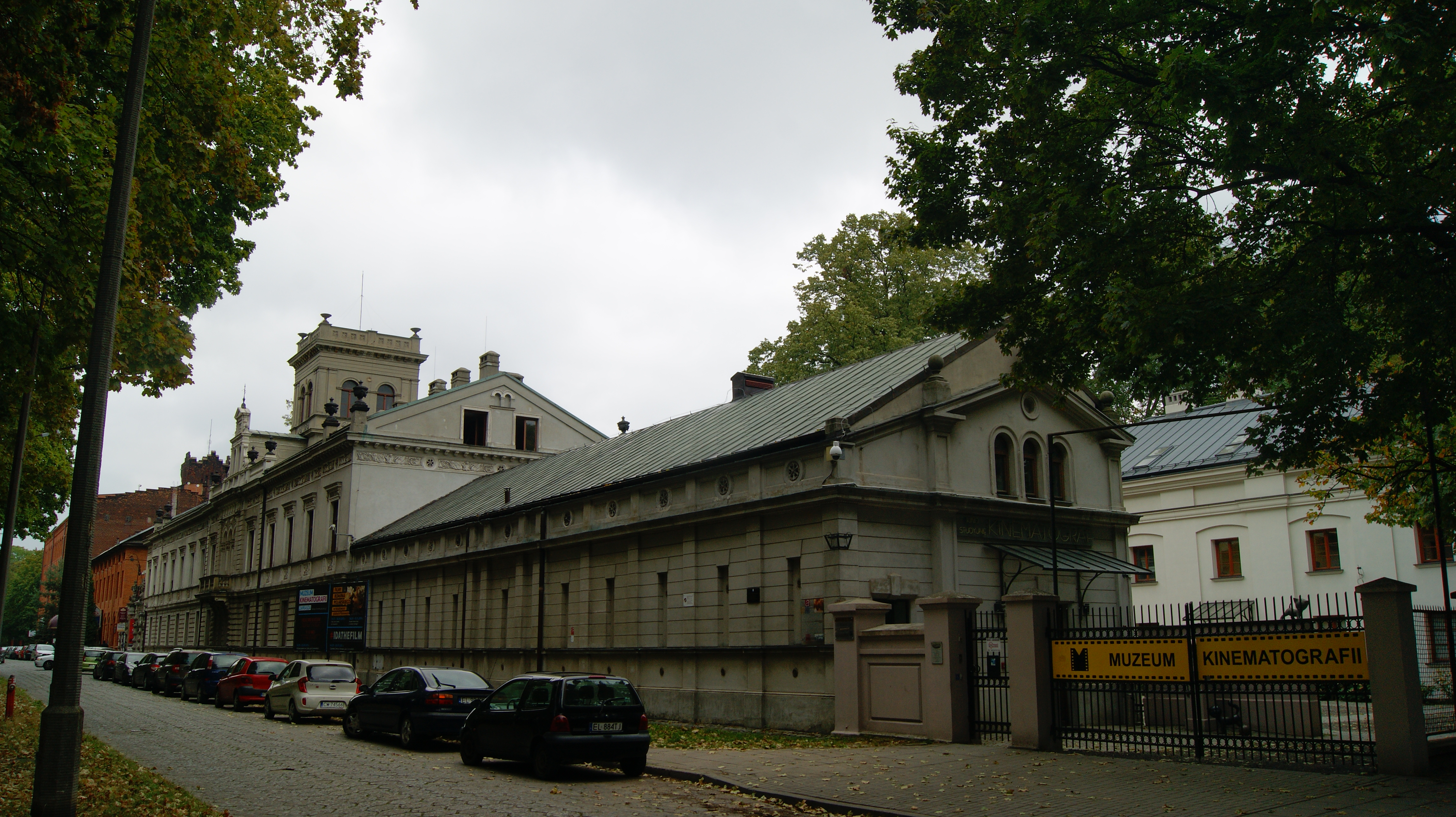 Siedzibą muzeum jest pochodząca z połowy XIX w. rezydencja Karola Scheiblera, jednego z największych łódzkich przemysłowców pochodzenia niemieckiego, z racji fortuny i skali produkcji zwanego "królem bawełny".